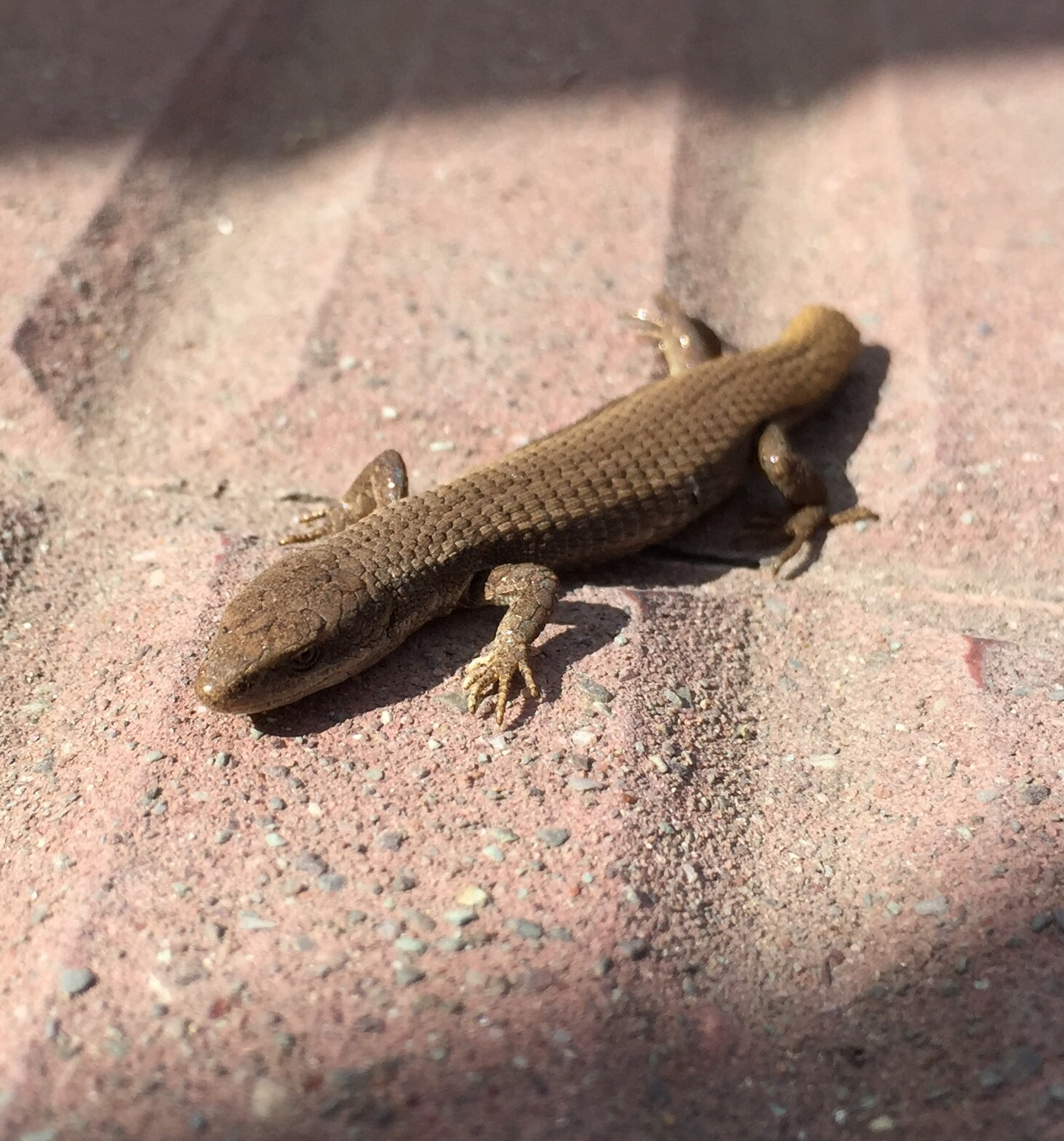 Ututo salteño